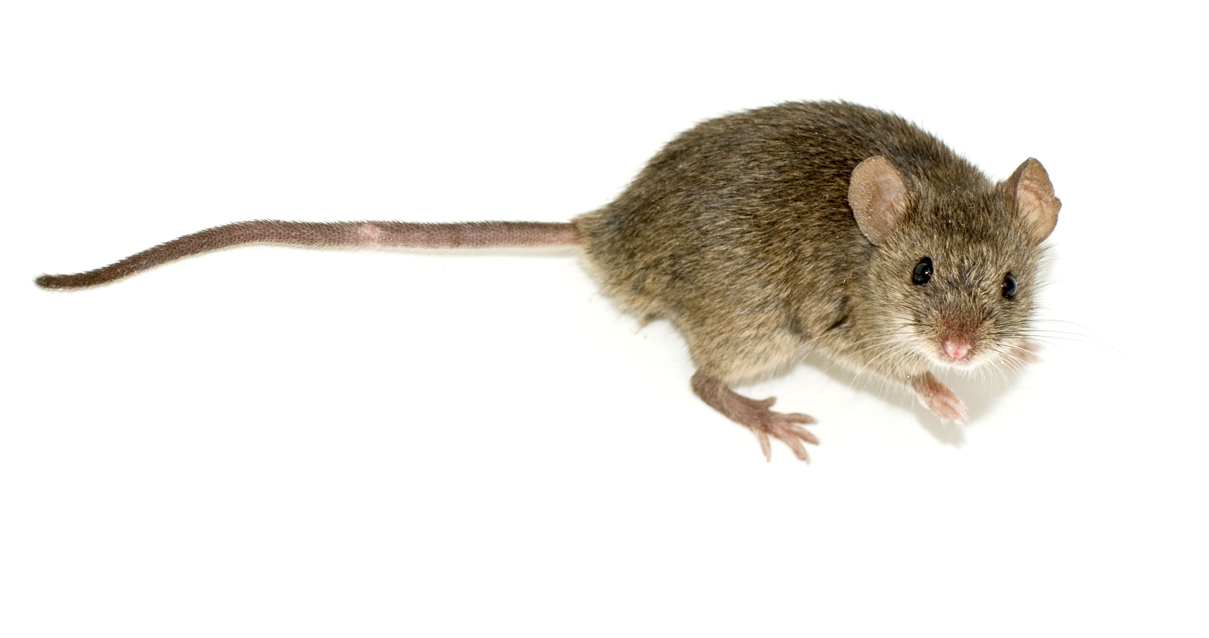 Мышь домовая Mus musculus